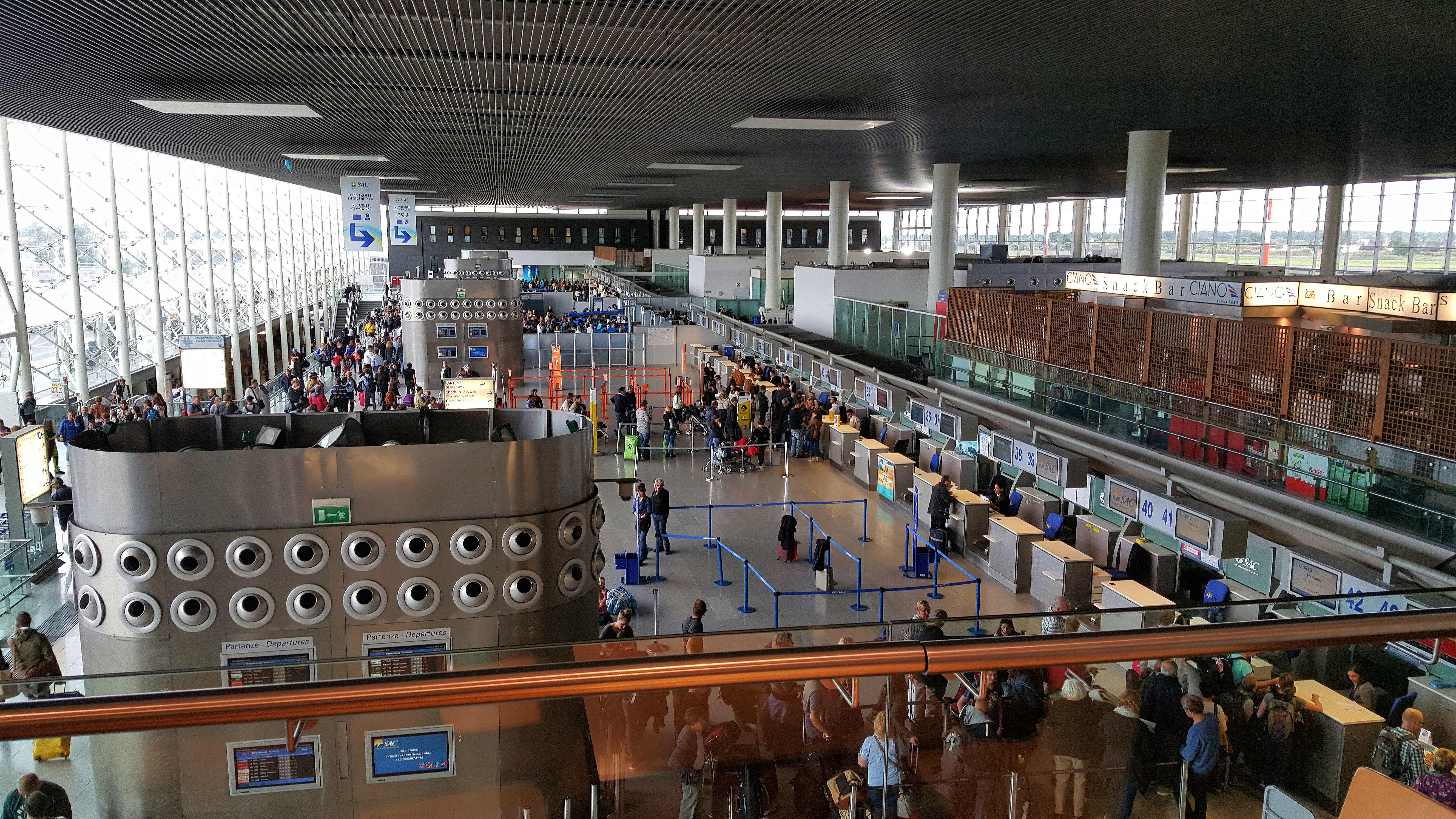 Banchi di check-in al terminal dell'Aeroporto di Catania-Fontanarossa.